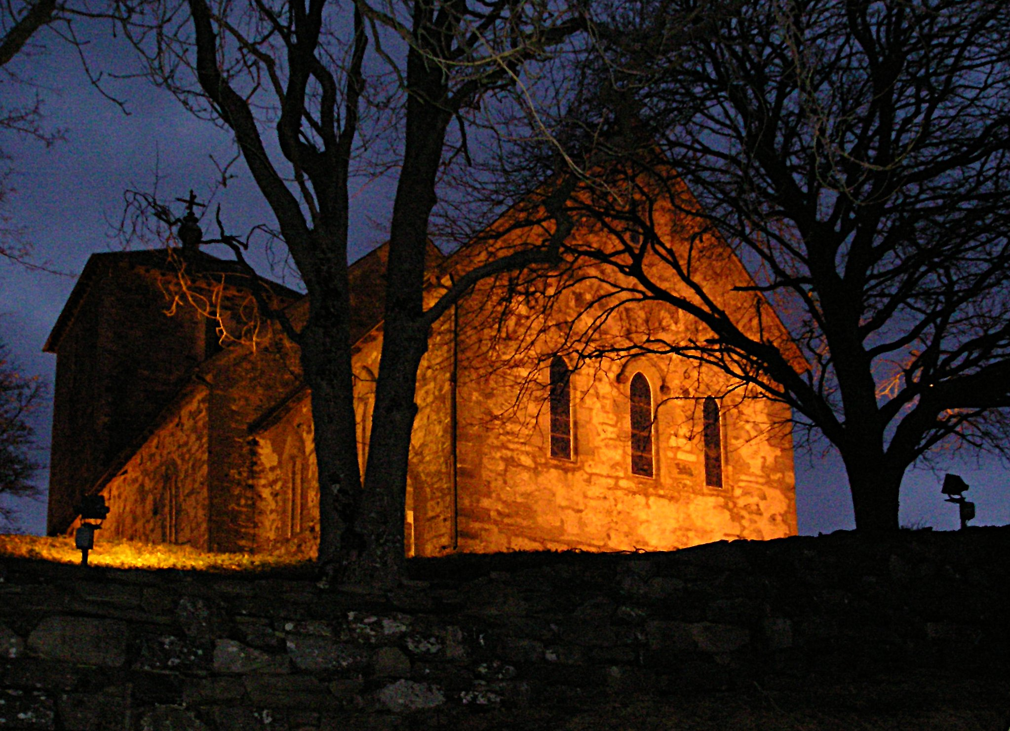 Avaldsnes medieval stone church